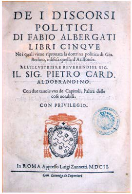 De i discorsi politici libri cinque ... ne i quali viene riprovata la dottrina politica di Giovanni Bodino e difesa quella di Aristotele, di Fabio Albergati, Roma 1602 e Venezia 1603